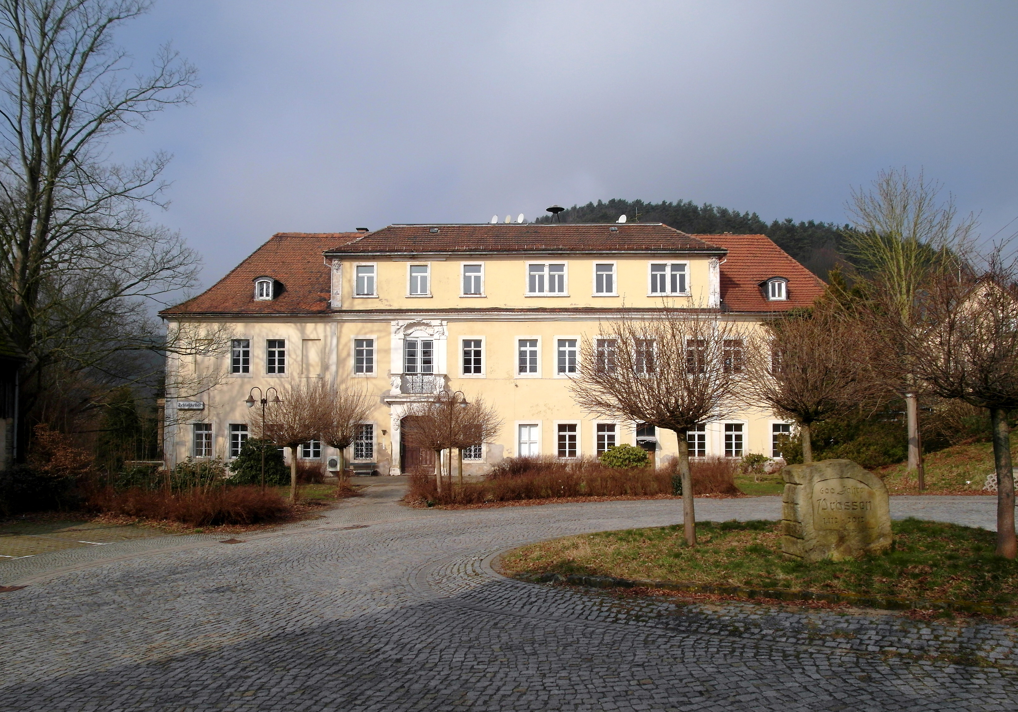 09.03.2016 01814 Prossen (zu Porschdorf): Schloß Prossen, Gründelweg 15. Hofseite. Die Besiedlung des Gebietes des Elbsandsteingebirges begann im 12./13. Jahrhundert; die des heutigen Pross´ner Territoriums ist sehr wahrscheinlich auf das Wirken des Grafen Wiprecht von Groitzsch zurückzuführen. Danach folgt eine lange Geschichte wechselnder Besitzer. Caspar Heinrich von Schönberg hat offenbar einen großen Anteil am Wiederaufbau des Rittergutes. Johanna Eleonore von Lüttichau aber hat ihn 1693 vollendet und entsprechende Zeichen gesetzt. Heute noch sind die Buchstaben GJELB als die Initialen von Gottlob und Johanna Eleonore von Lüttichau geb. Borckin im Balkongeländer des Herrenhauses zu sehen. [SAM3436.JPG]20160309105DR.JPG(c)Blobelt